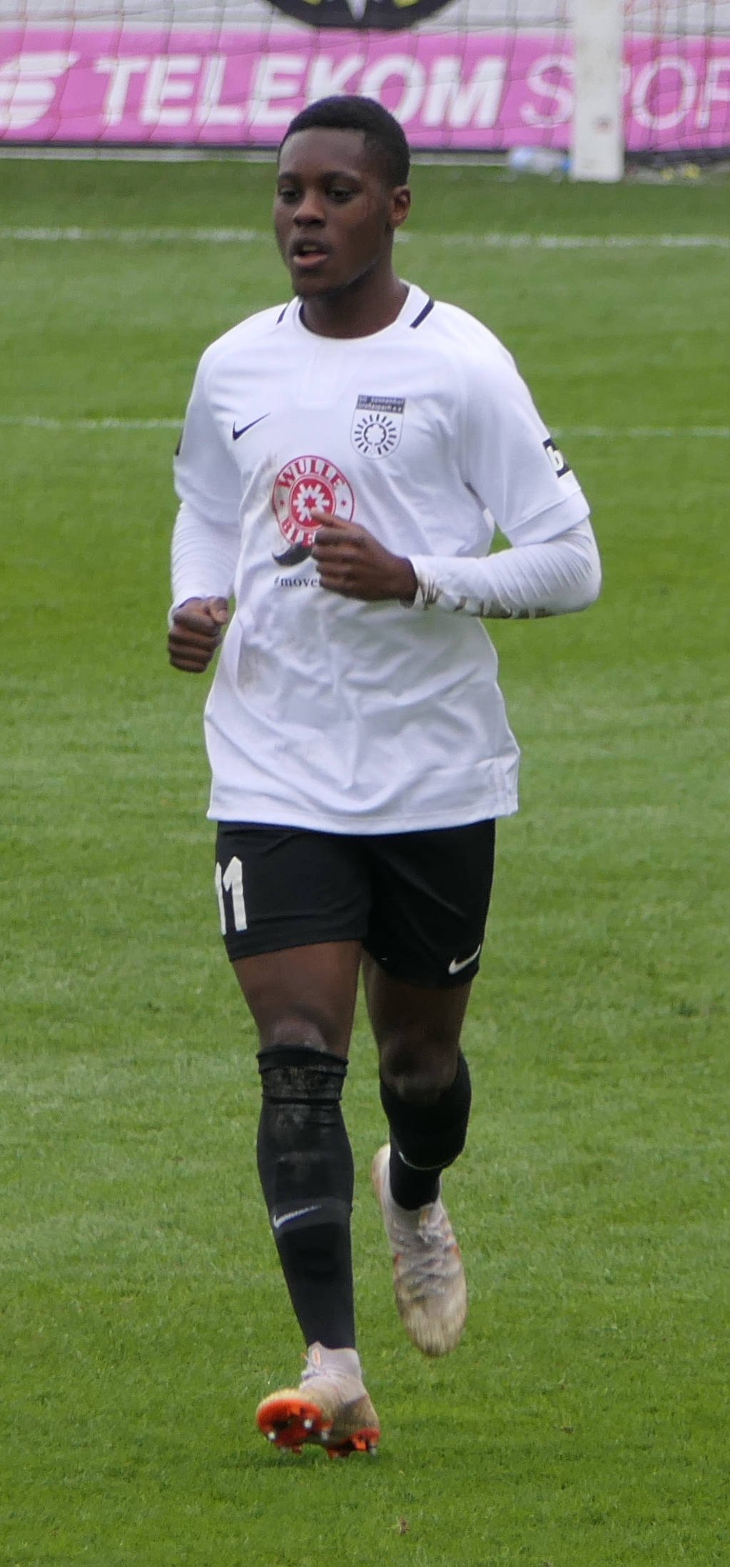 Der Fussballprofi Makana Baku im Trikot der SG Sonnenhof Großaspach beim Heimspiel gegen Eintracht Braunschweig am 03.11.2018.